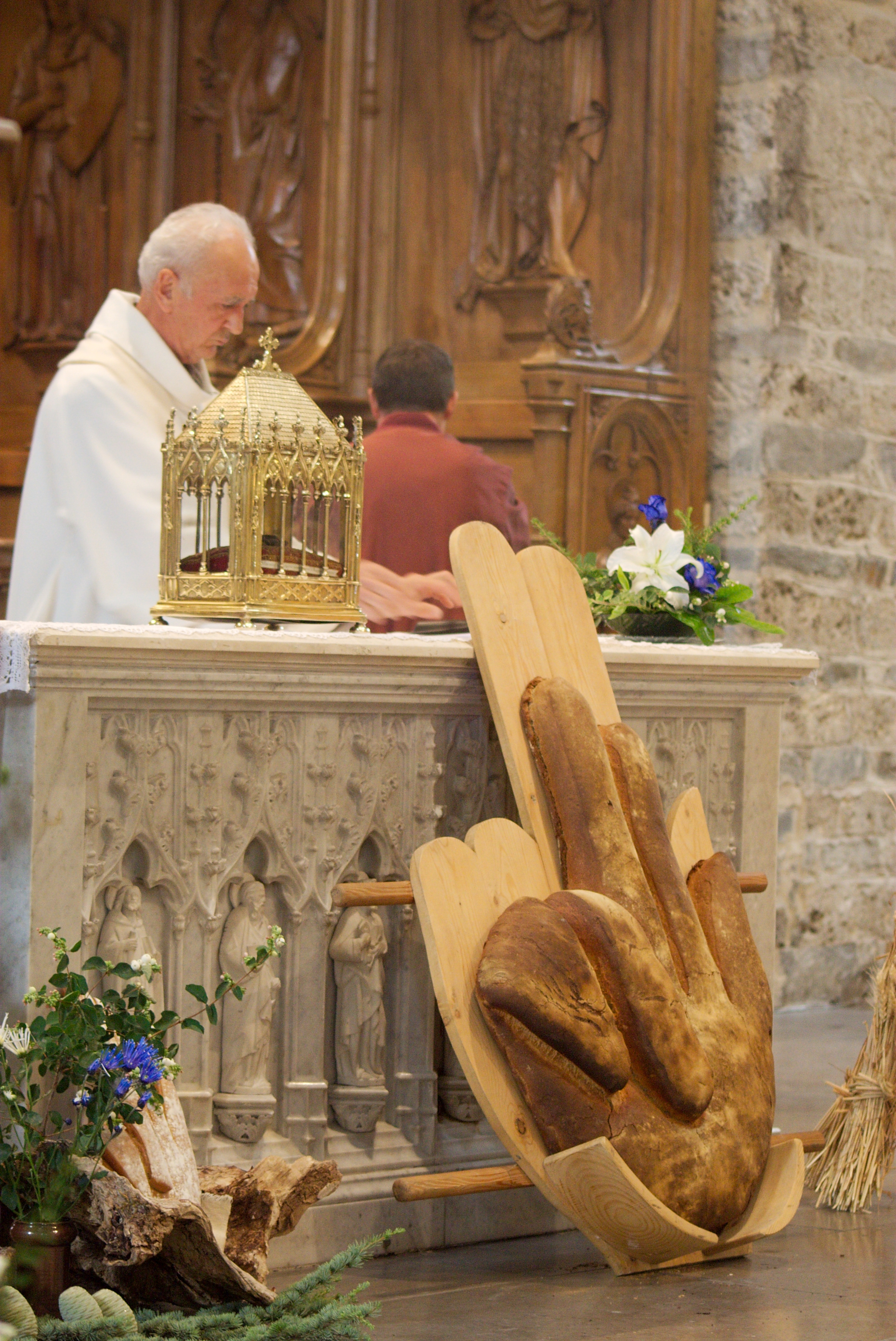 Reliques de Saint Jean-Baptiste, dans la Cathédrale Saint-Jean-Baptiste de Saint-Jean-de-Maurienne